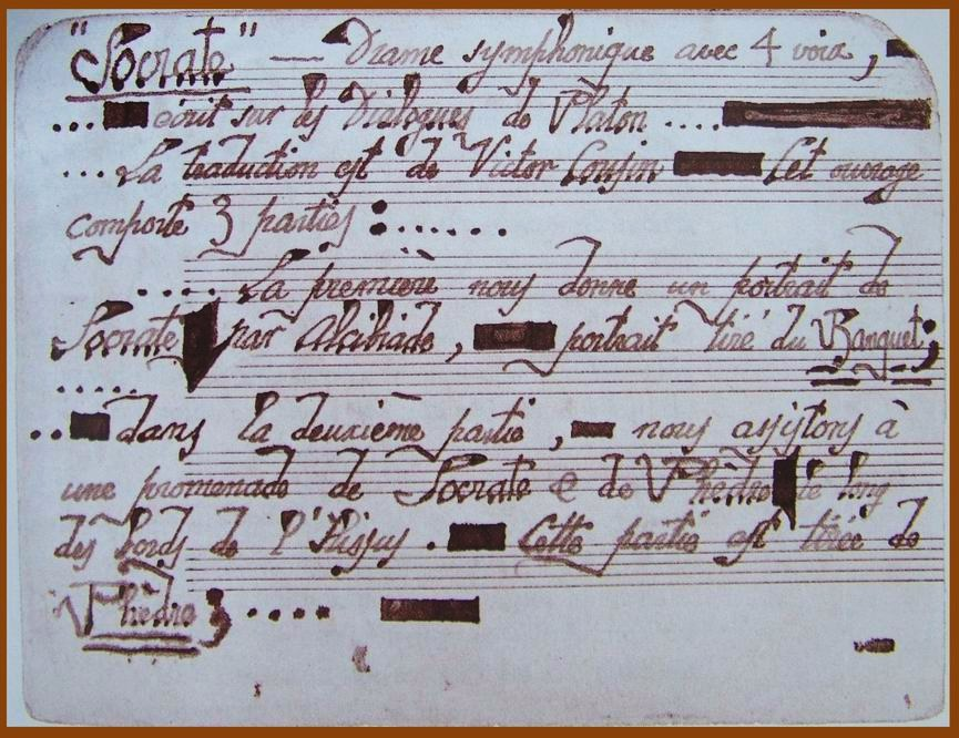 Аннотация Эрика Сати к плану написания симфонической драмы "Сократ", которую он сделал тушью на нотной бумаге для княгини Эдмон де Полиньяк, 1916 год, осень